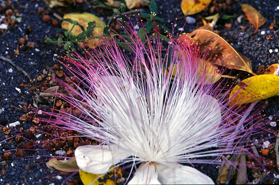 Tangkoko NP, Sulawesi INDONESIA